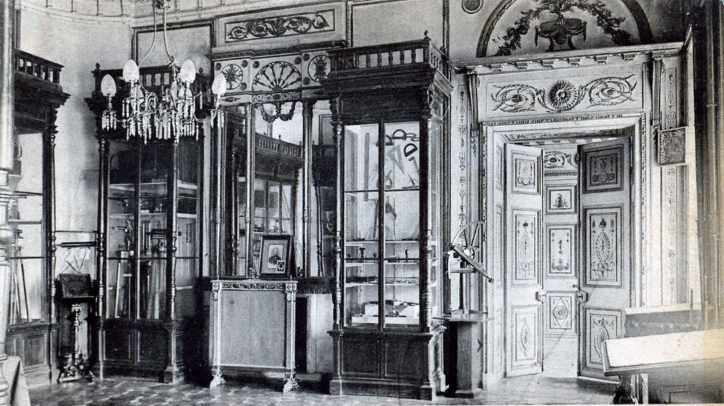 The cartography museum in the "Golden Rooms" of the Demidov Palace in Moscow Помещения музея Константиновского межевого института в Гороховском переулке